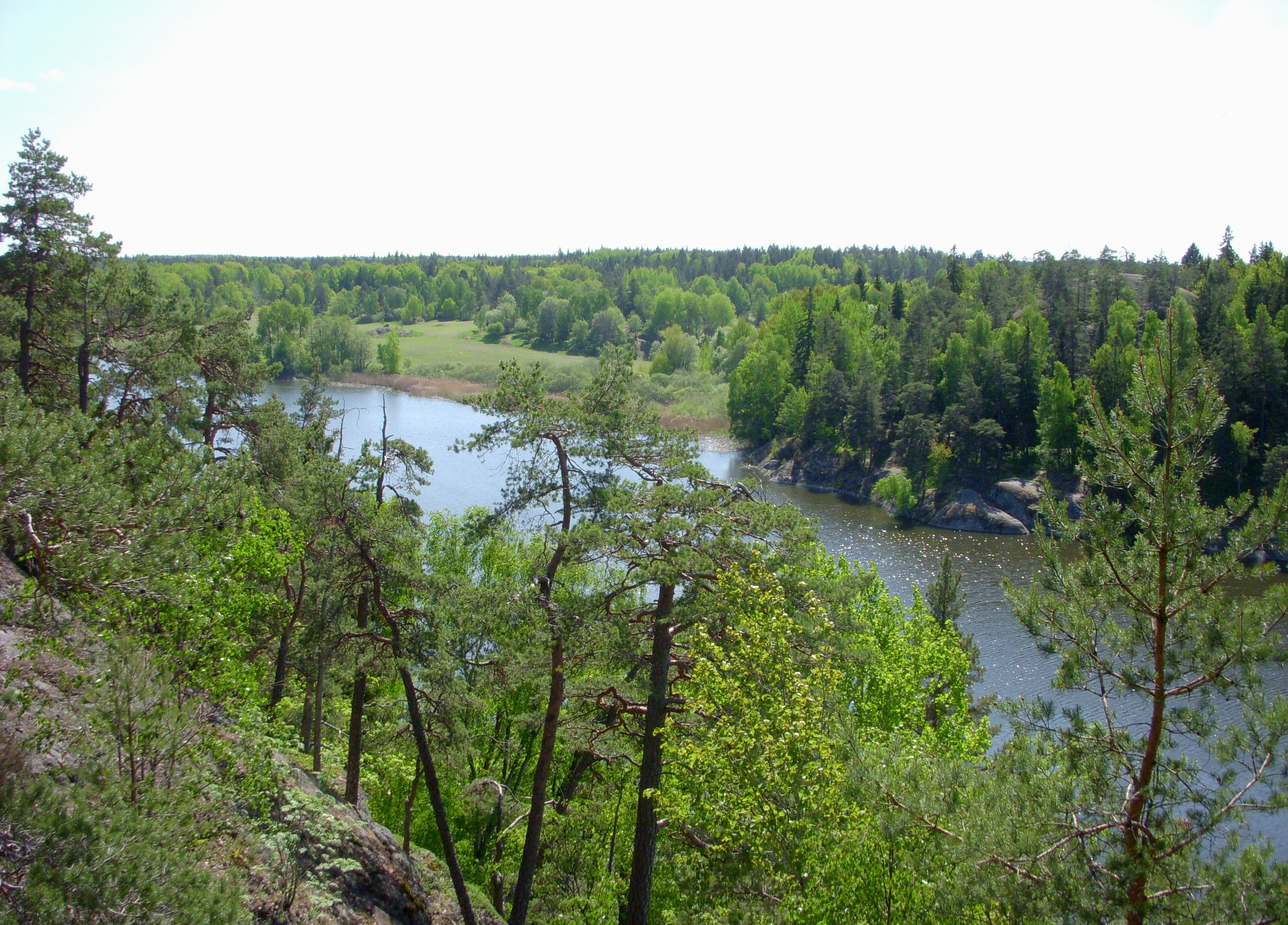 Flemingsbergsviken (vy mot sydost)